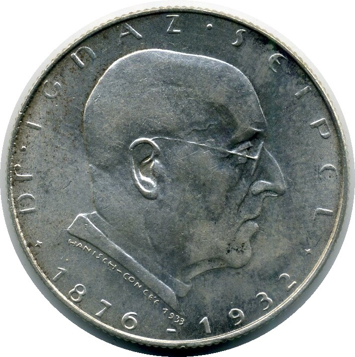 Bildseite der 2-Schilling-Gedenkmünze aus dem Jahr 1933